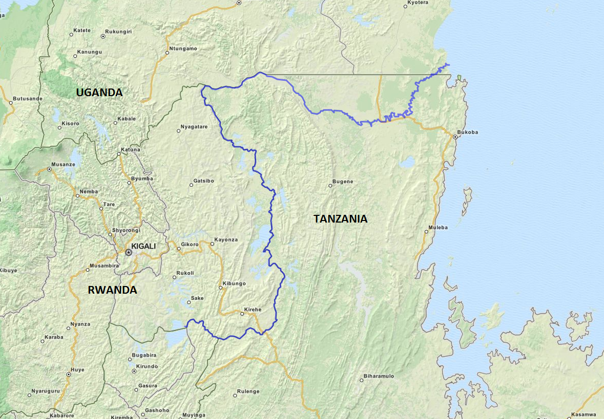 Cours de l'Akagera